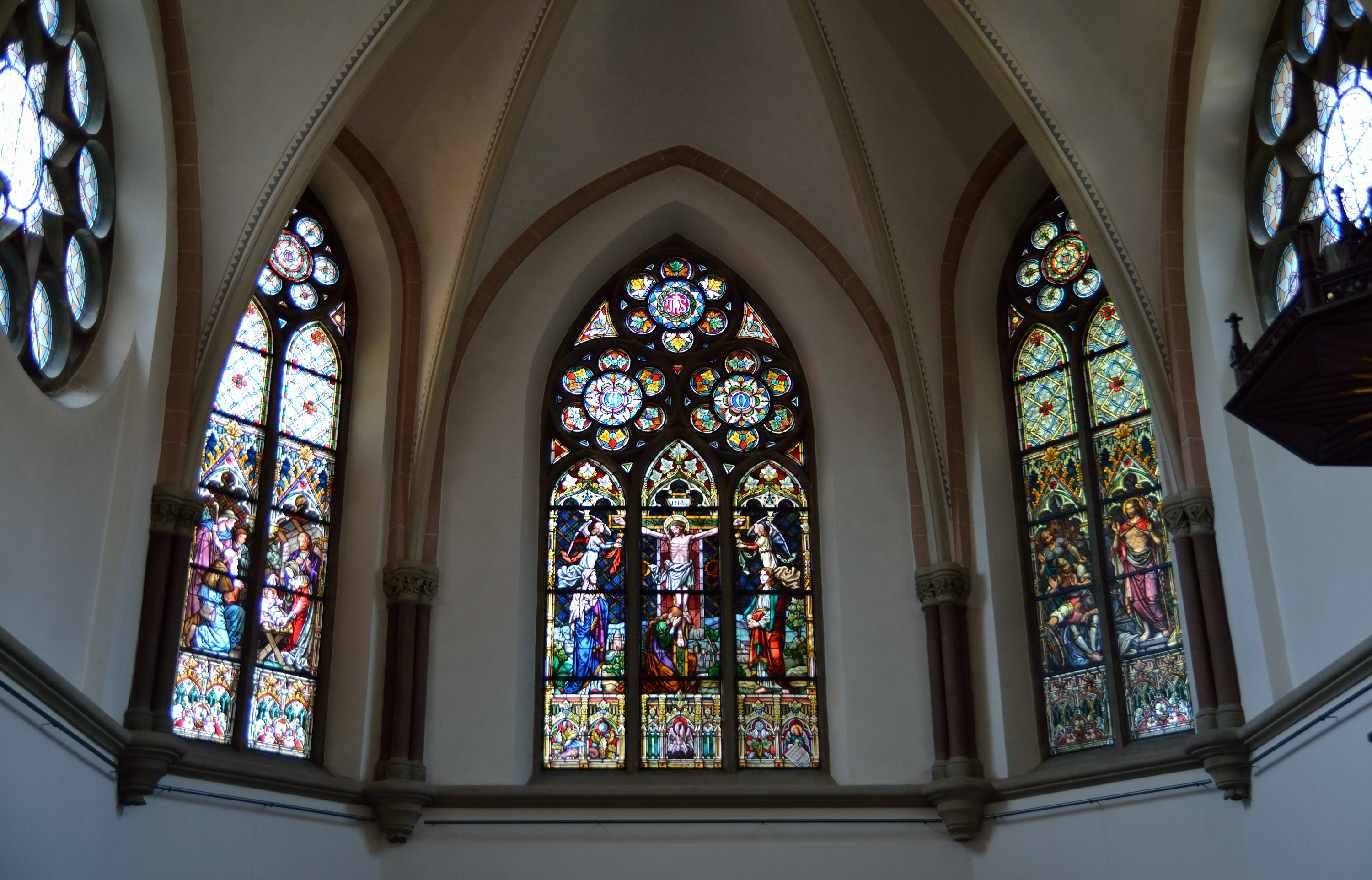 Chorfenster in der Detmolder Martin-Luther-Kirche